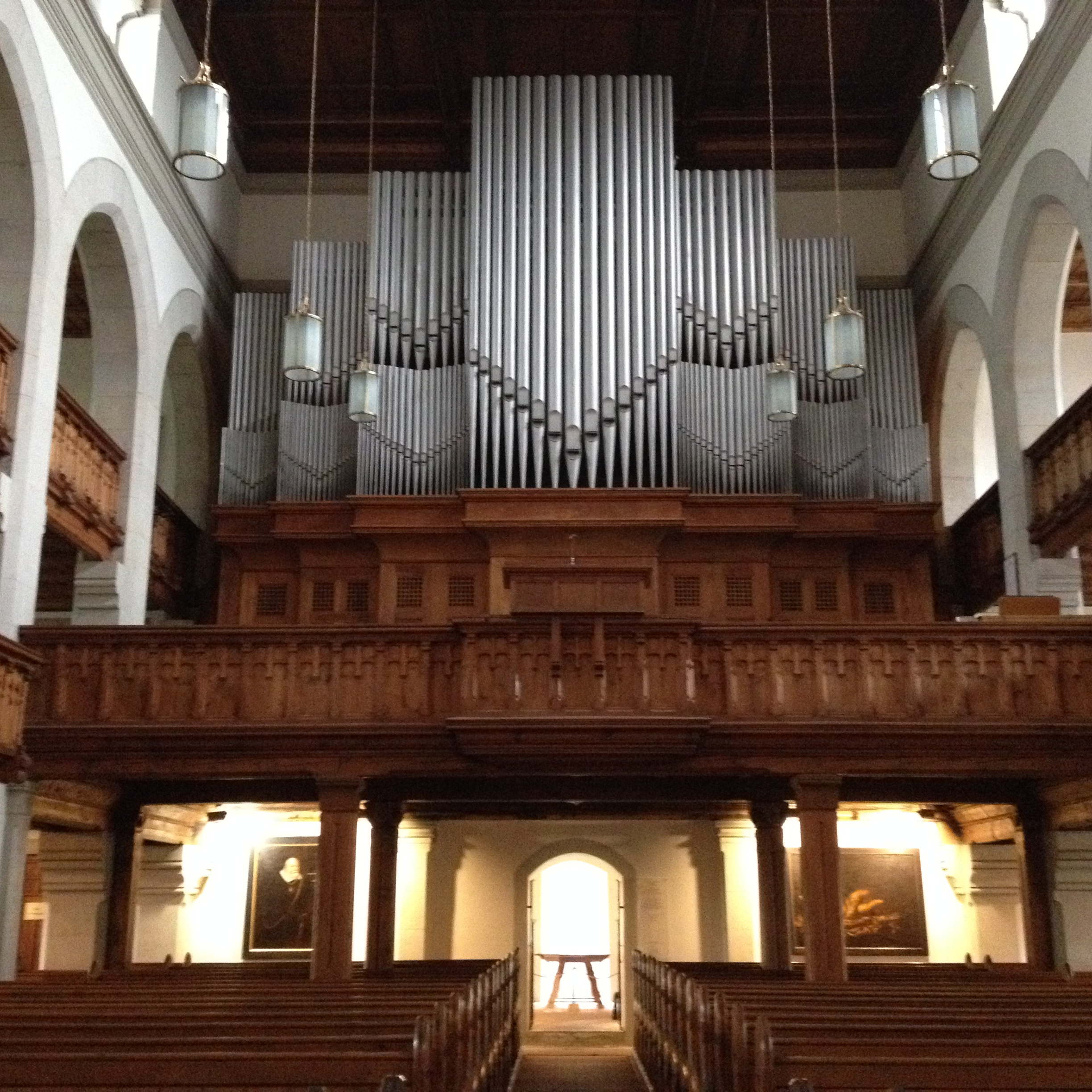 Friedenskirche zu Radebeul